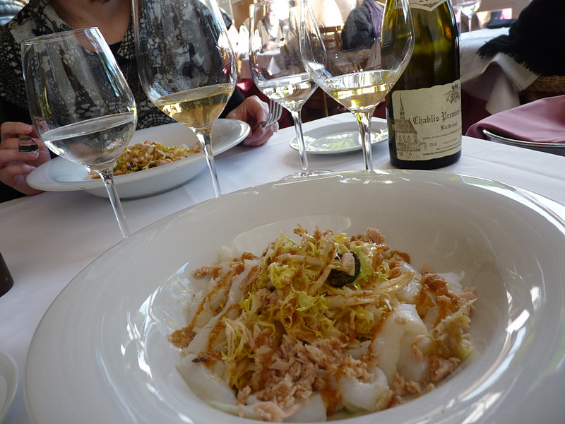 Xató